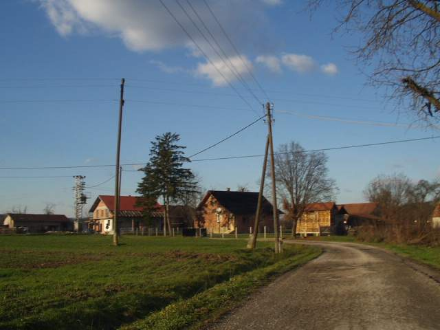 selo Podolec